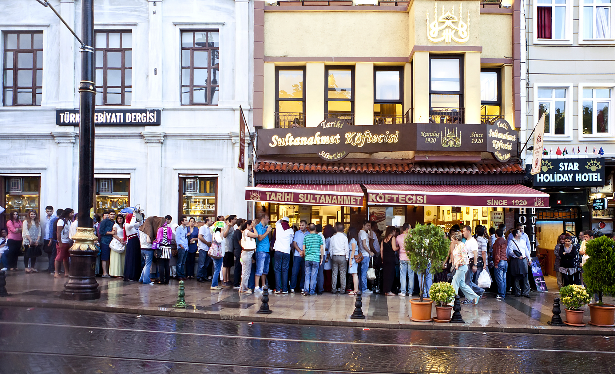 Tarihi Sultanahmet Köftecisinde Lezzet Kuyruğu